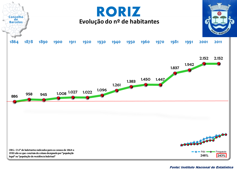 Censos 1864/2011